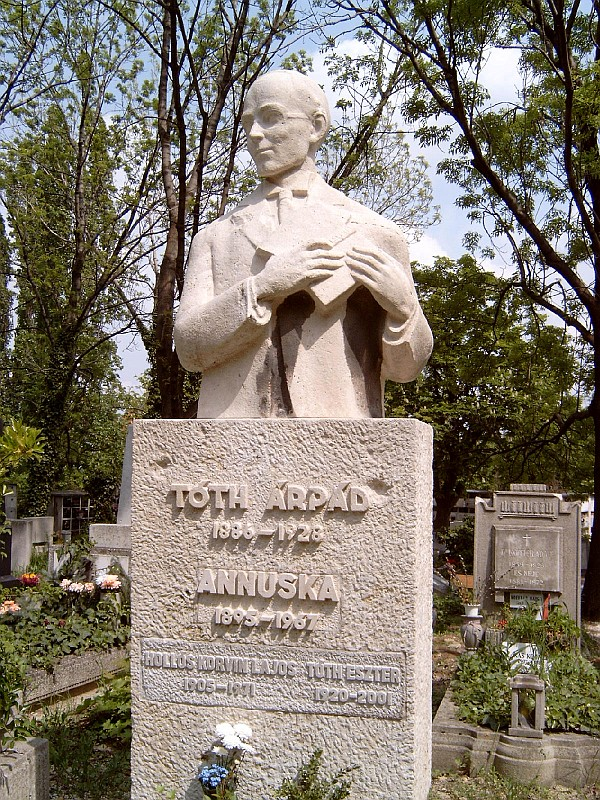 Tóth Árpád, Hollós Korvin Lajos és Hollós Korvin Lajosné Tóth Eszter sírja Budapesten. Farkasréti temető: 42-1-12.